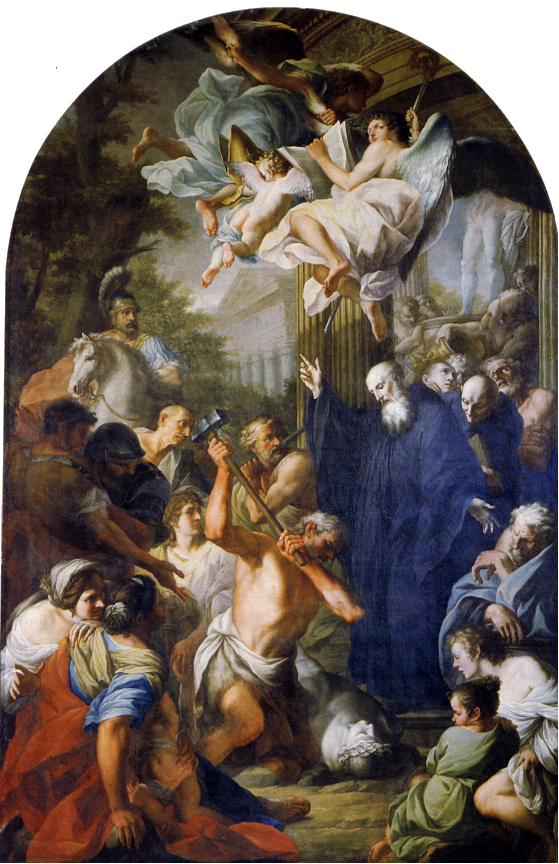 Palermo, Chiesa dell'Immacolata Concezione al Capo: San Benedetto ordina la distruzione degli idoli; olio su tela di Giuseppe Velasco del (1775).